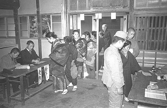 Bureau de vote lors des élection législatives japonaises du 10 avril 1946.